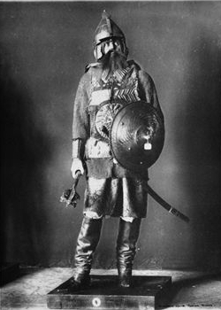 Фотография "Московский сотенный голова XVII века", 1885-1887 гг., Фотоателье М.М. Панова, Архив Музеев Московского Кремля, Ф.60, д.33, л. 354.